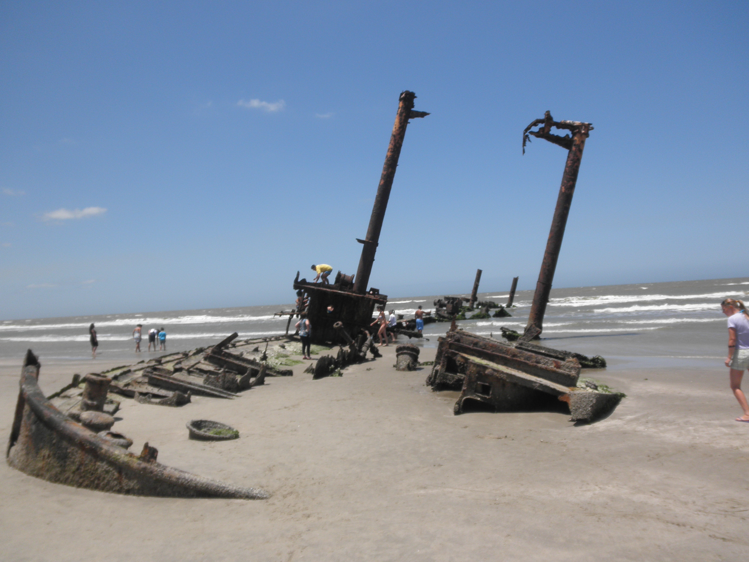 Navio encalhado fotografado em 19 jan. 2011 na praia do Cassino (Rio Grande, RS)